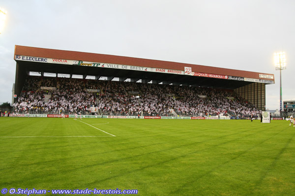 La tribune Foucauld du Stade Françis Le Blé à Brest un soir de match